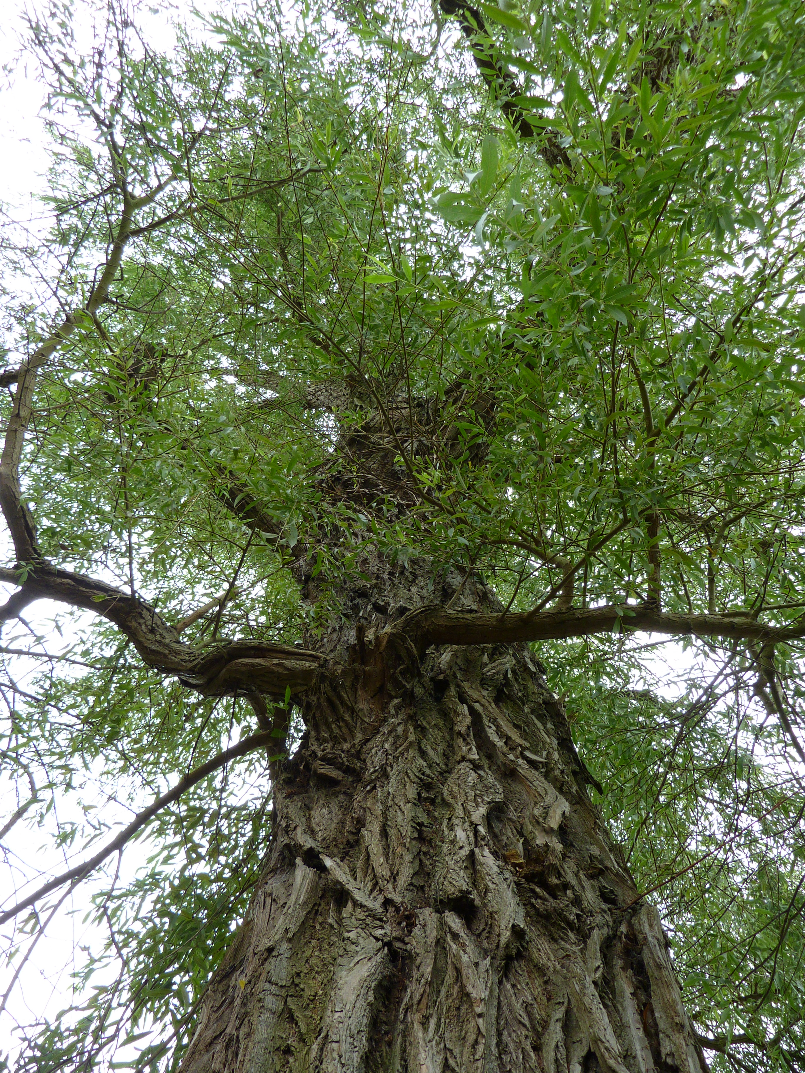 Salix alba 'Vitellina'